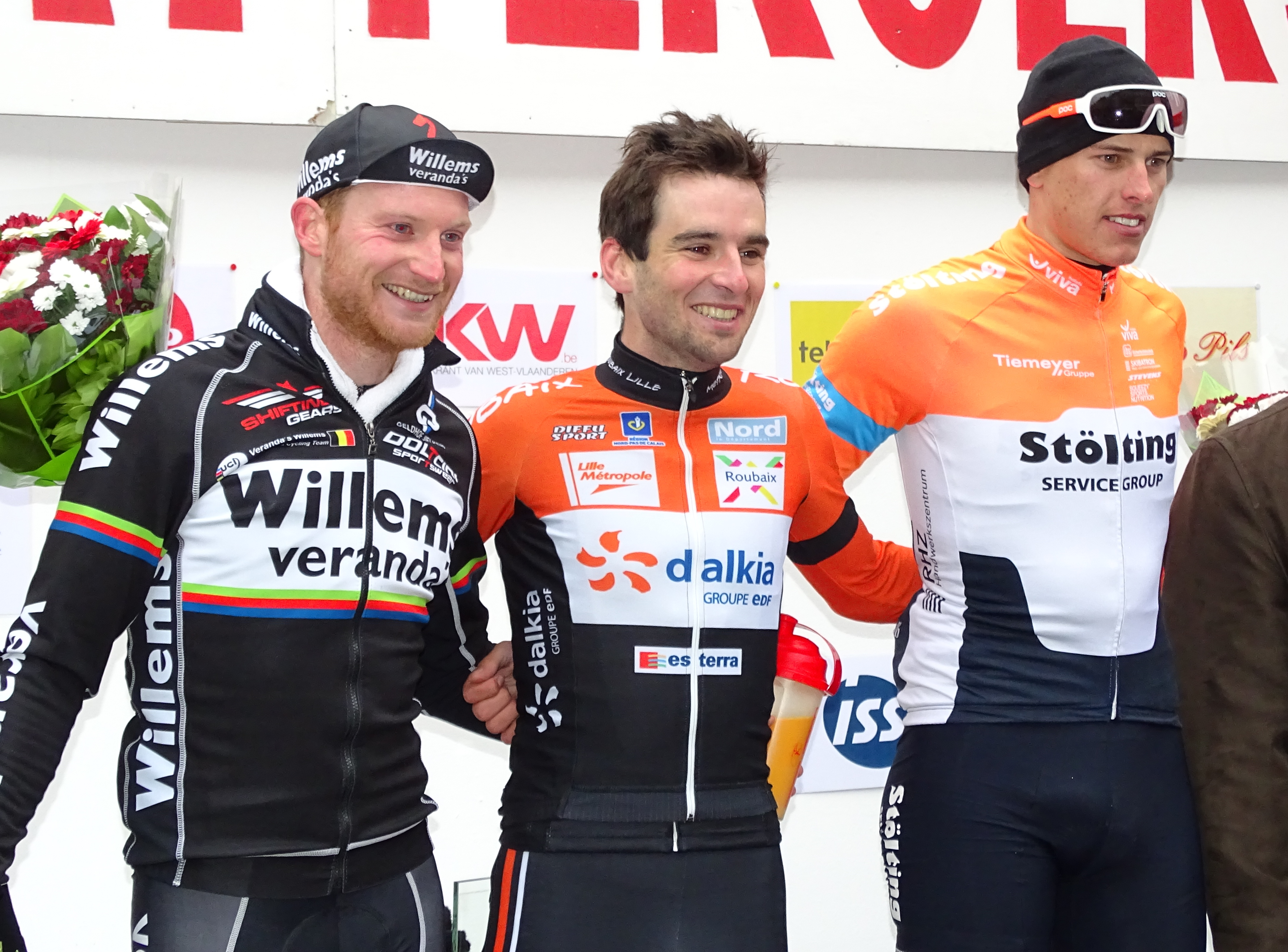 Reportage réalisé le dimanche 15 mars à l'occasion du départ et de l'arrivée de la Course des chats 2015 à Ypres, Belgique.